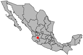 Locator map of Guadalajara, Jalisco, Mexico